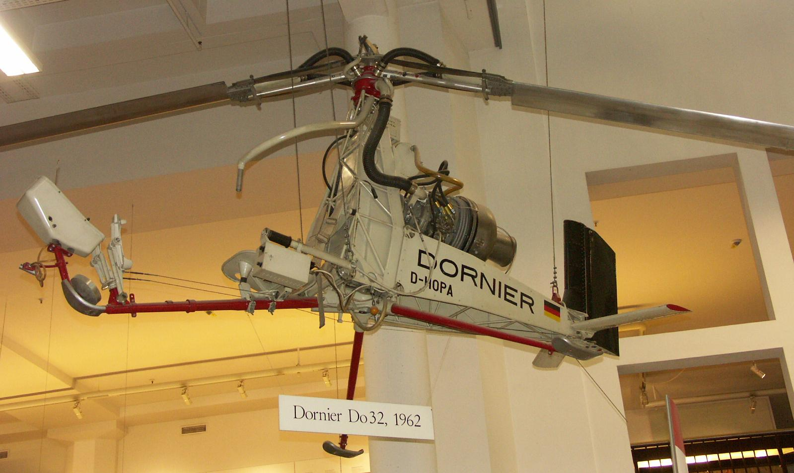 Photo by Jean-Patrick Donzey in Deutsches Museum